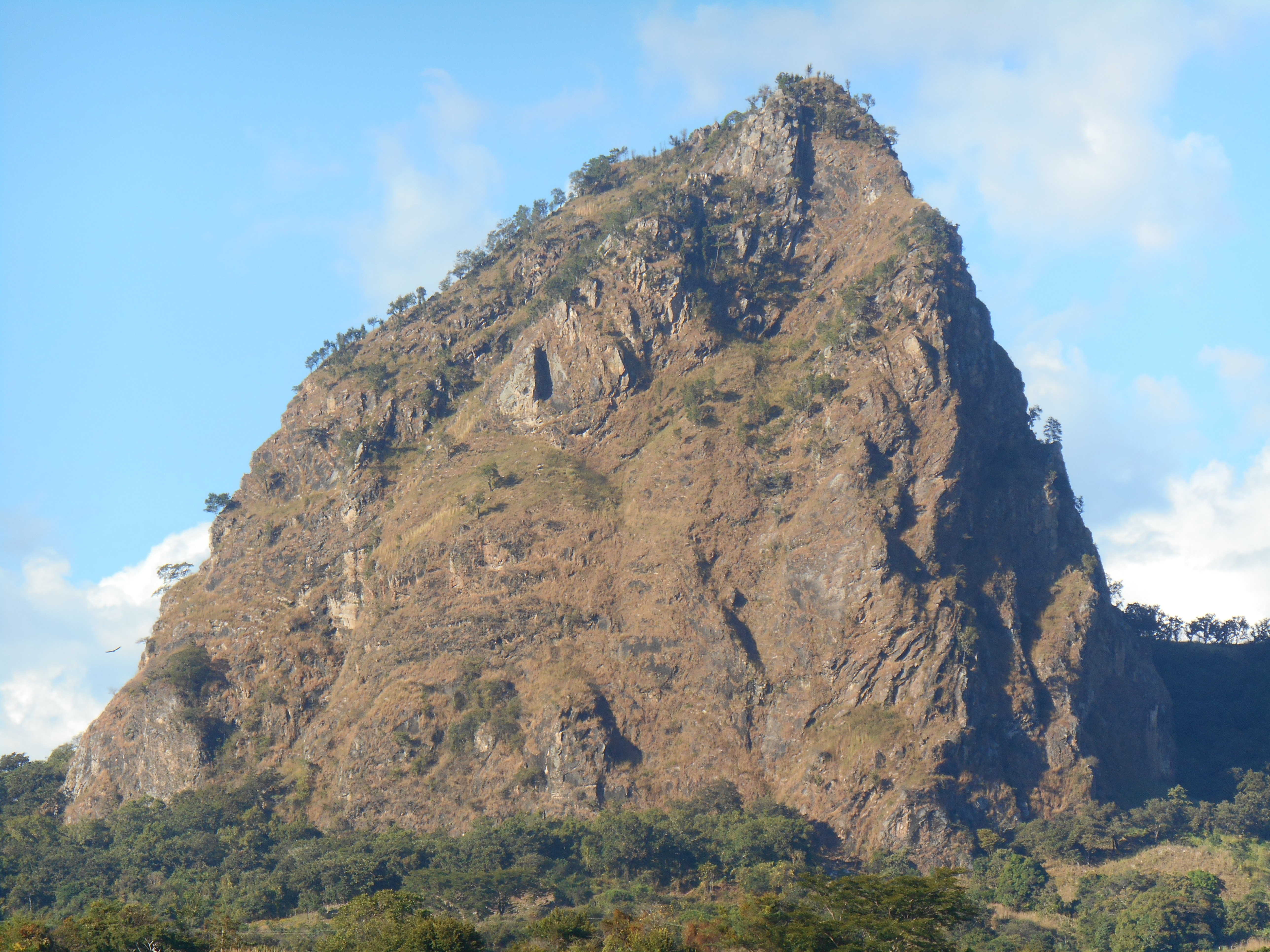 Símbolo de Nicolás Ruiz, Chiapas.